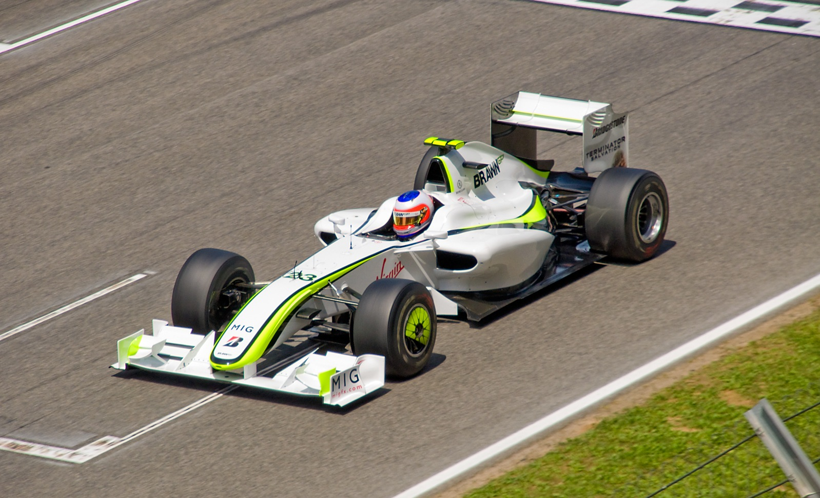 Nikon D90 + Sigma 18-200 DC OS HSM 1/1600s - F/10 - 200mm - ISO640